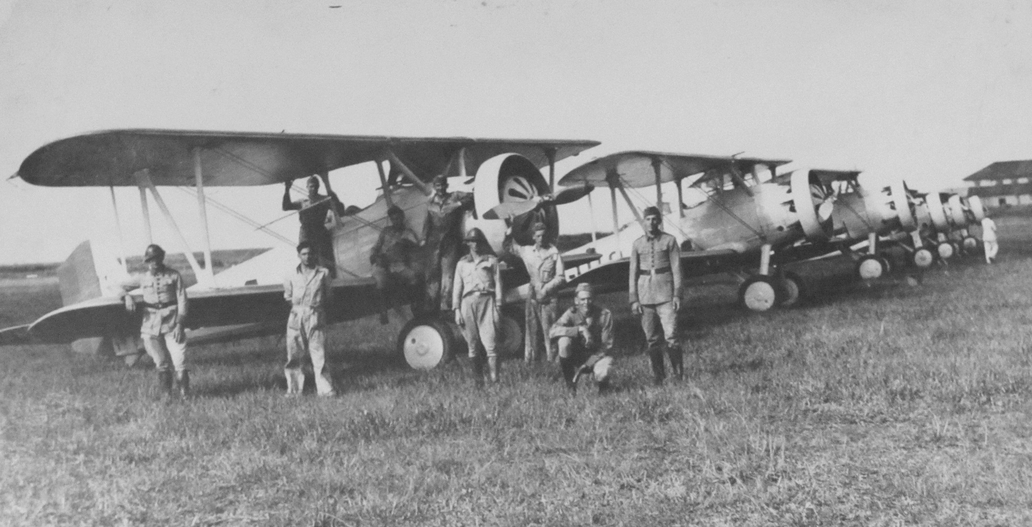 Antigo quartel do 5° Regimento de Aviação em Curitiba, Paraná, Brasil.